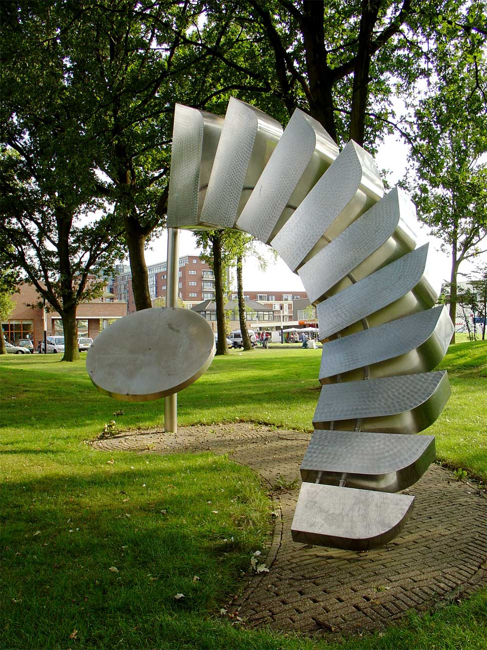 Generaal Maczek monument monument door Karin Hardonk - Generaal Maczekplein Stadskanaal